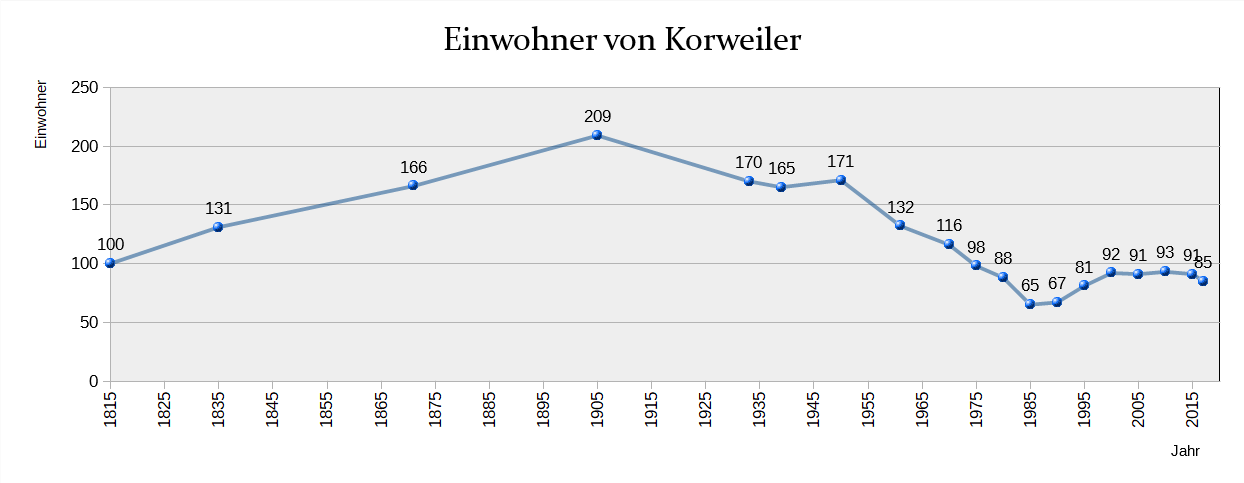 Stand Dezember 2017